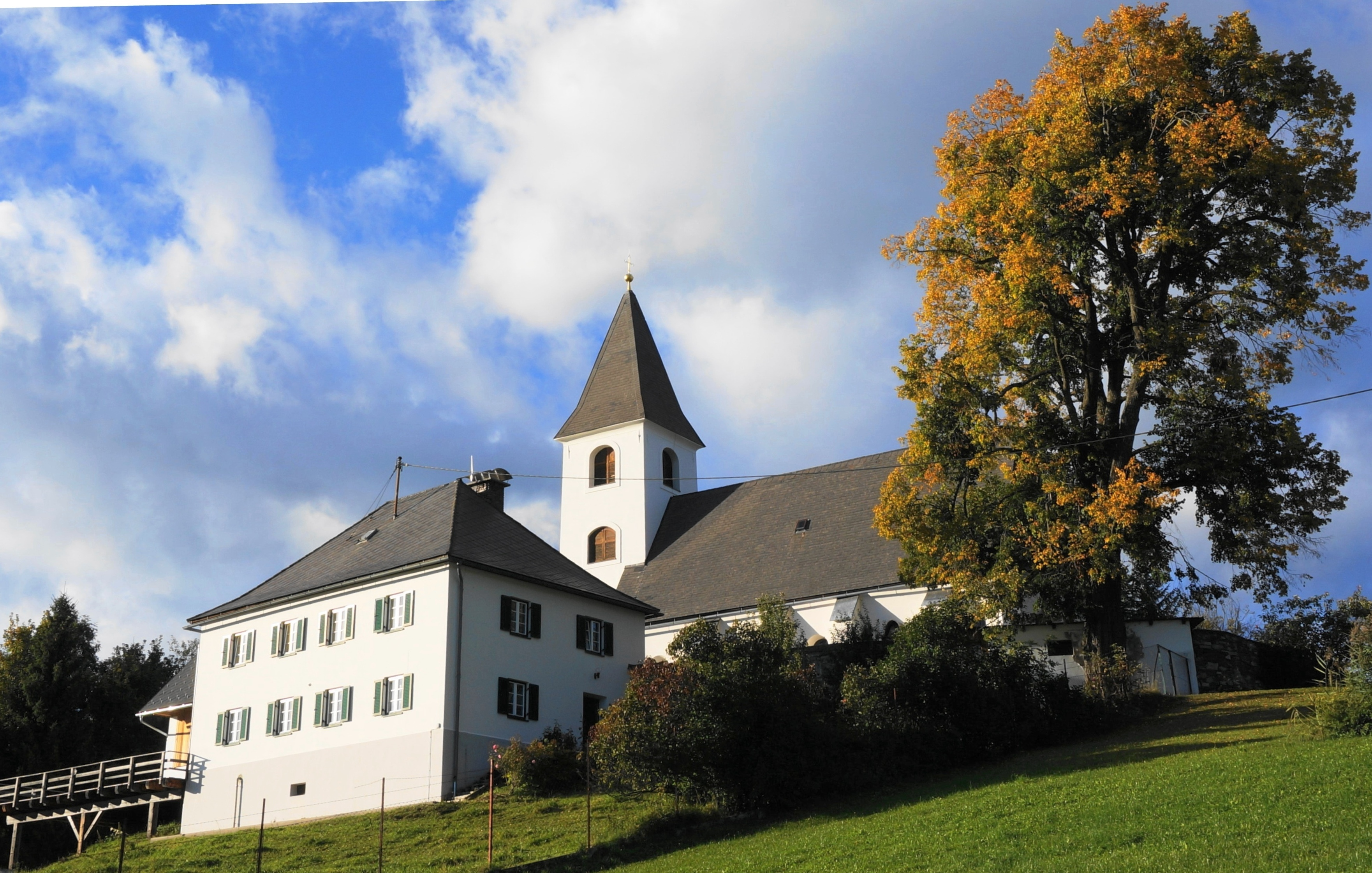 Kath. Pfarrkirche hl. Nikolaus und Friedhof